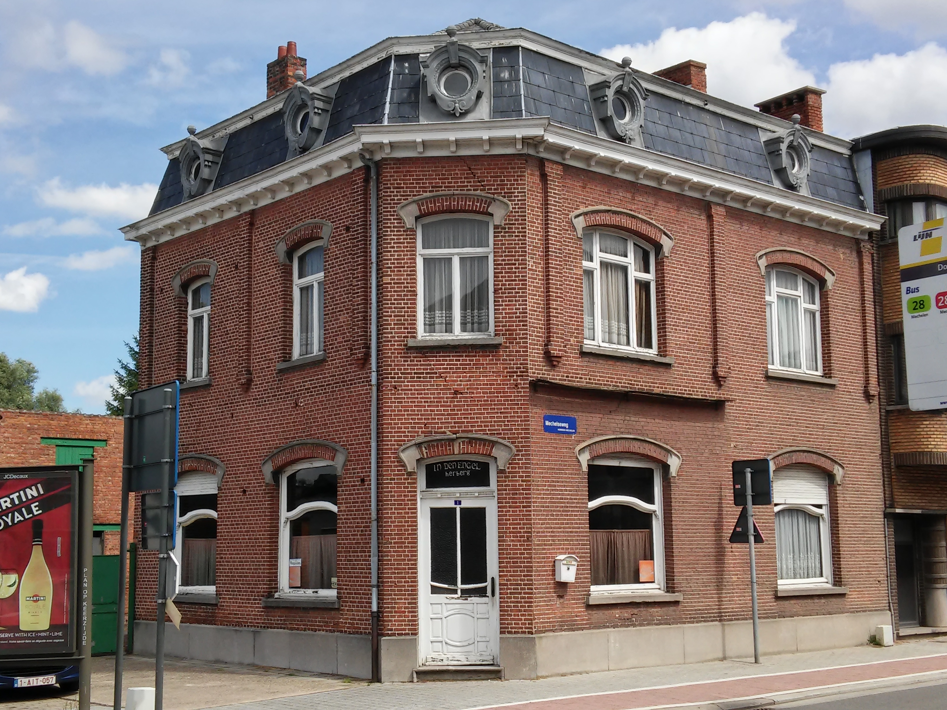 Herberg In den Engel, Mechelseweg 1, Hombeek